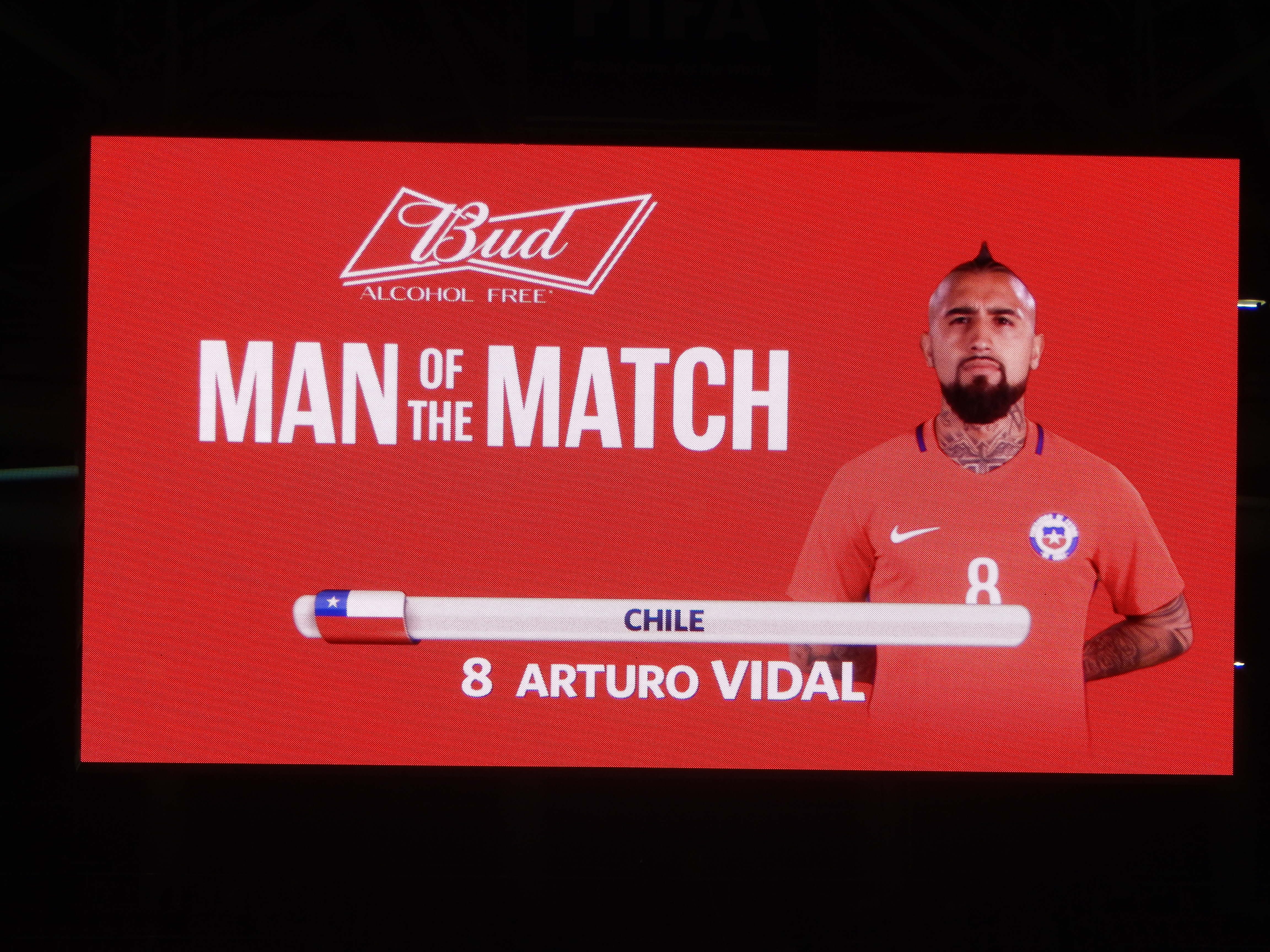 Артуро Видаль был признан лучшим игроком матча